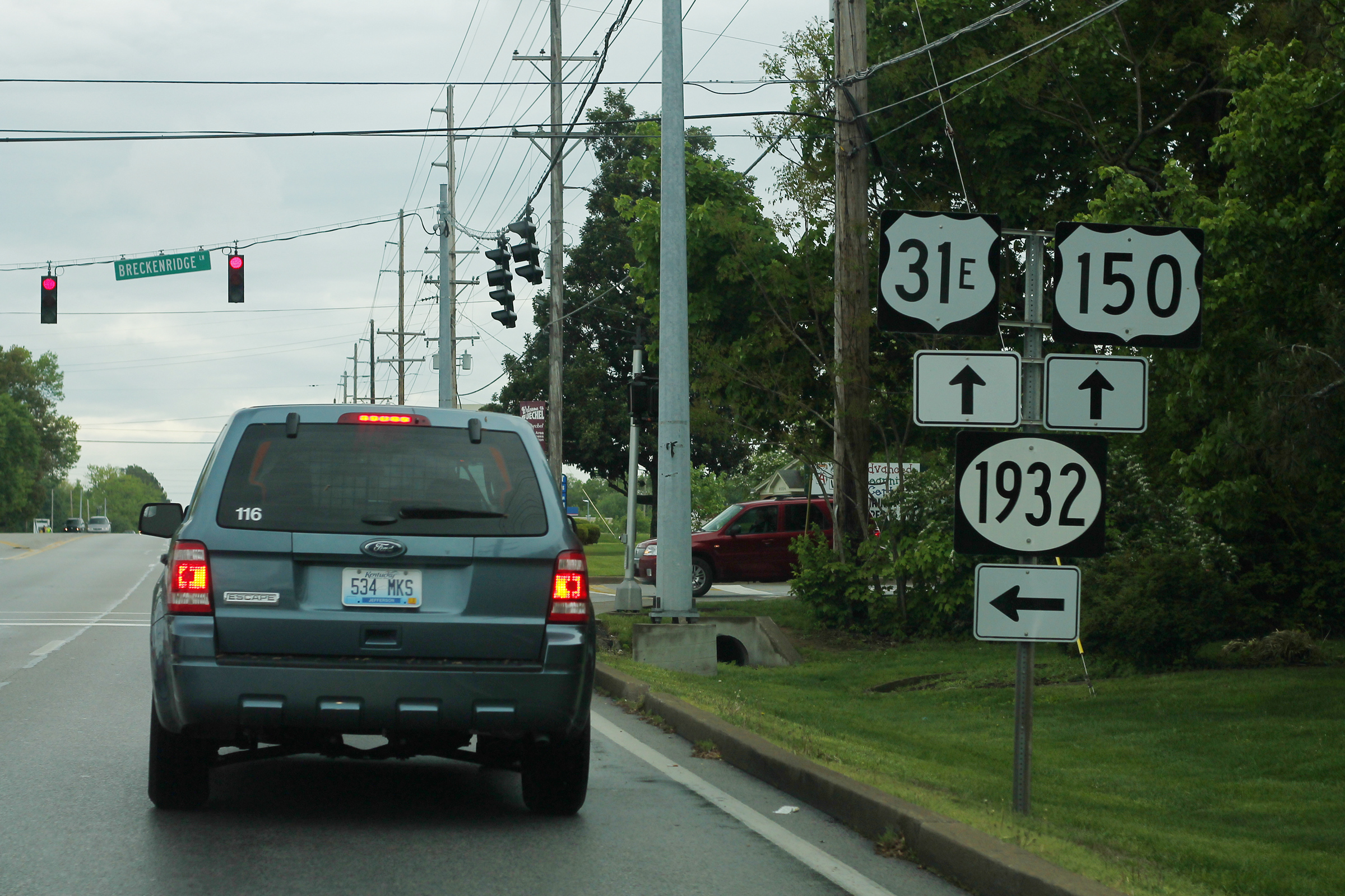 US31EsUS150sRoad-KY1932signs